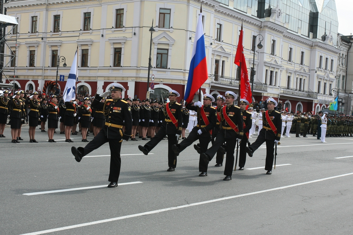 9 мая во Владивостоке праздничные мероприятия начались в 09.00 с торжественного подъема Государственного и Андреевского флагов перед штабом Тихоокеанского флота. В 10.00 в центре Владивостока, на улице Светланской, состоялся военный парад, в честь Дня Победы, который приветственным словом предварил командующий ТОФ адмирал Сергей Авакянц. При исполнении Государственного гимна Российской Федерации впервые в столице Приморского края прозвучал артиллерийский салют, который производился из салютных орудий на Корабельной набережной